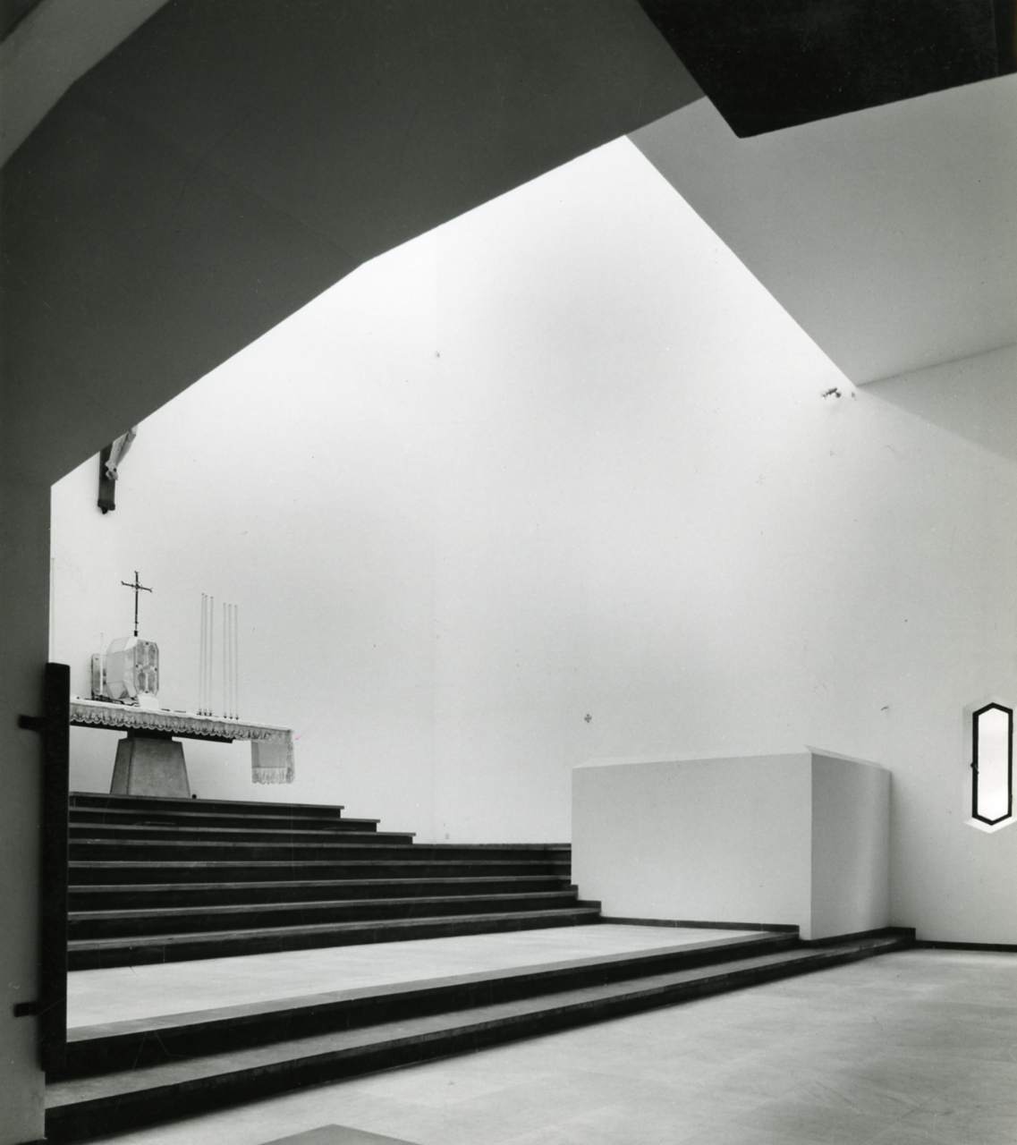 Servizio fotografico : Genova, 1960 / Paolo Monti. - Stampe: 3 : Positivo b/n, gelatina bromuro d'argento/ carta, 18x24, 24x30. - ((Al verso delle stampe timbro a inchiostro con copyright (Via Colonna - Milano). - Sul coperchio della scatola iscrizione didascalica manoscritta a pennarello nero: "Archit. Moderna". - Occasione: Documentazione per pubblicazione su periodico "Casabella", Milano, Domus. - Fonte: Fogli pinzati di Paolo Monti: I. Carteggi/ Einaudi/ Elenco foto disponibili per il Dizionario di Architettura (s.d.), presso Archivio Paolo Monti. - Fonte: Rubrica di Paolo Monti: Archivio 10x12 (ultimi numerati) - dal G1 al (s.d.), presso Archivio Paolo Monti. - Fonte: Monografia di Fleming John, Honour Hugh, Pevsner Nikolaus: Dizionario d'architettura, Torino, Einaudi (1981). - Fonte: Periodico: Casabella, Milano, Domus (s.d.)